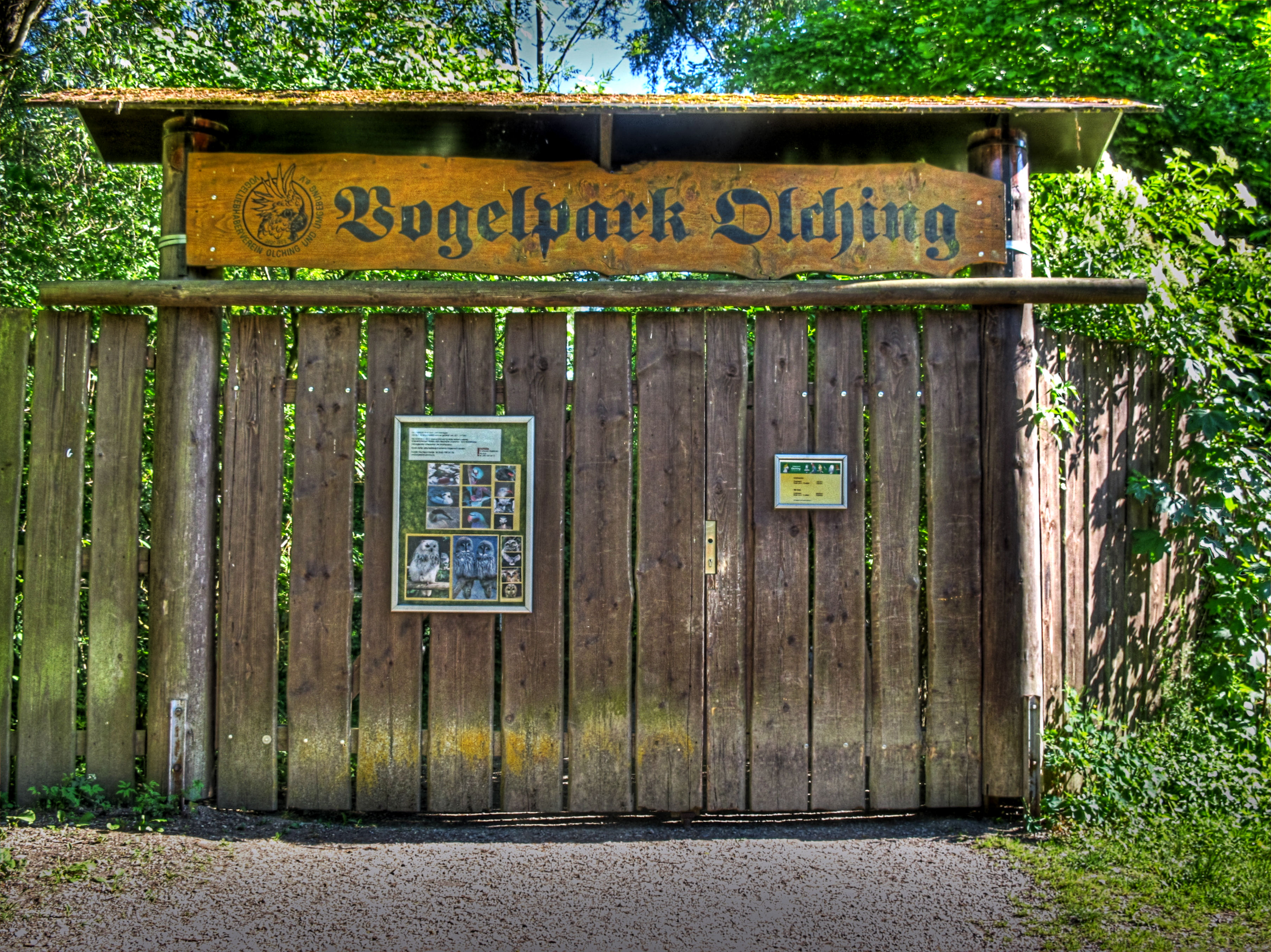 Deutschland, Bayern, OLching